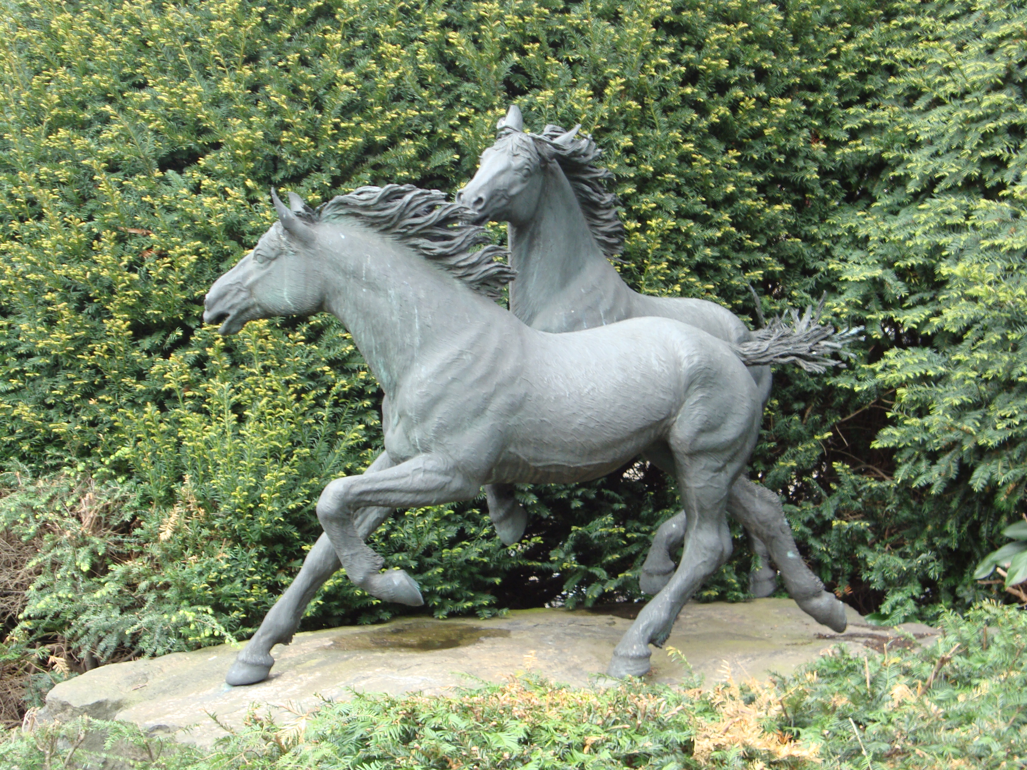 Skulptur von zwei Emscherbrücher Wildpferden vor dem Eingang der Heitkamp BauHolding